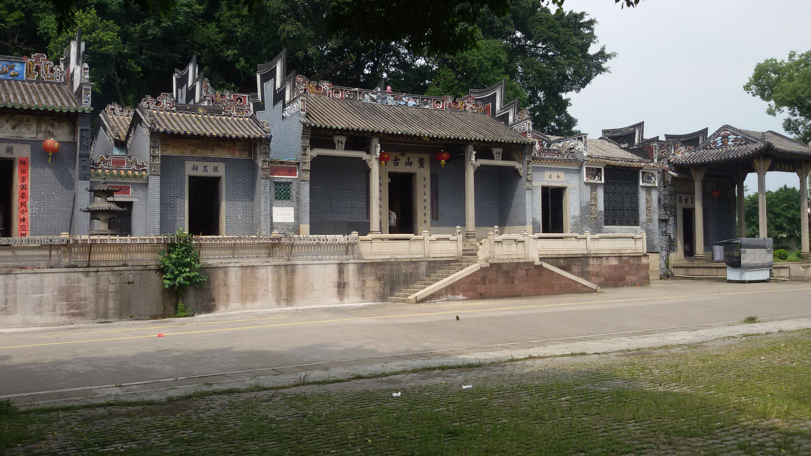 粵語: 番禺三善村 鰲山古廟群